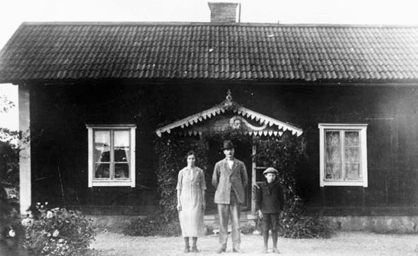 Bergby kvarn i Markim. Framför bostadshuset står Elsa Karlsson, mjölnare Hjalmar Karlsson, och sonen Birger Karlsson